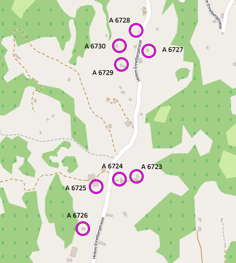 Artilleriestellung Ennetberg GL, Schweiz